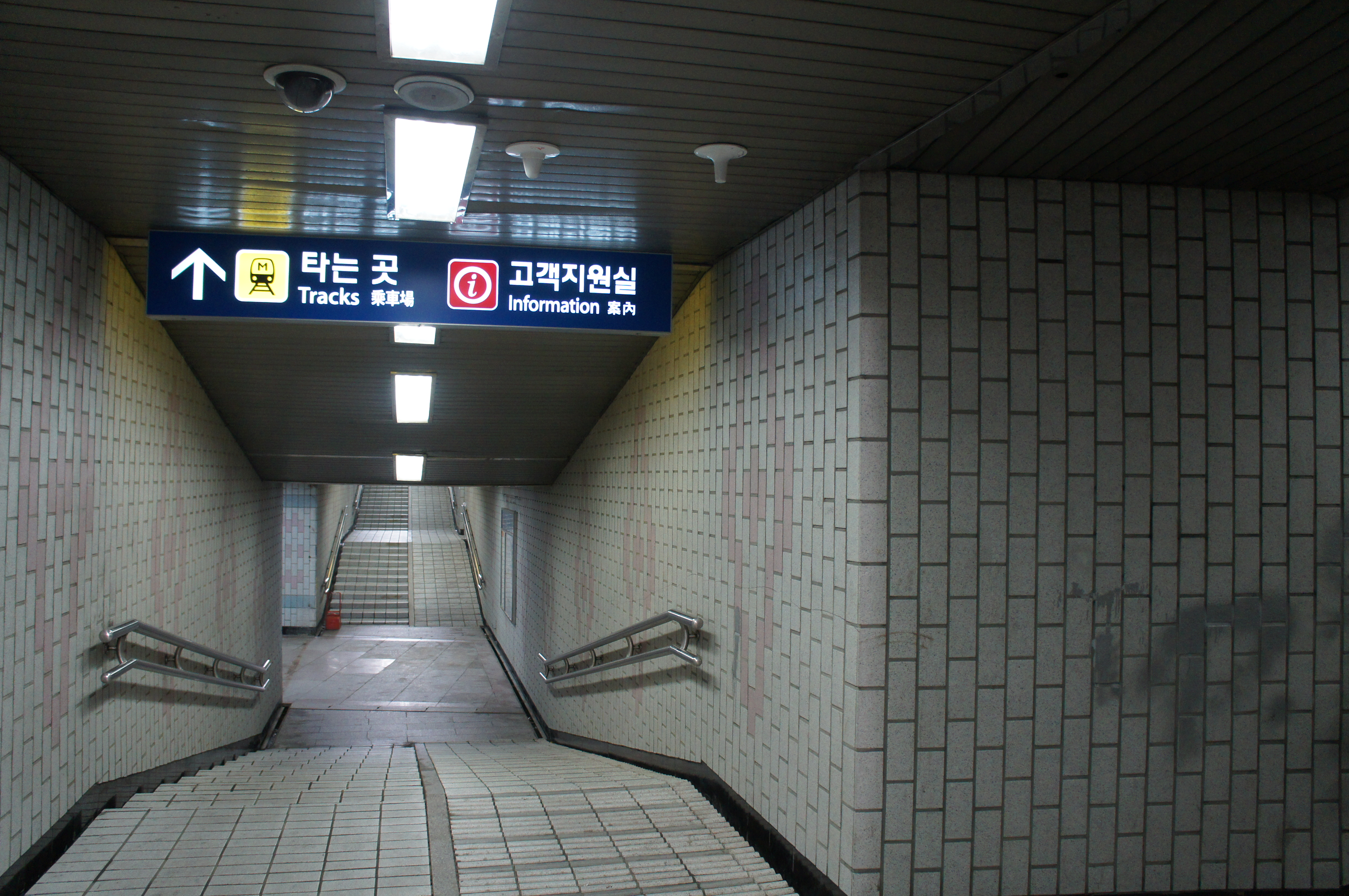 망포역 태장지하도 내부